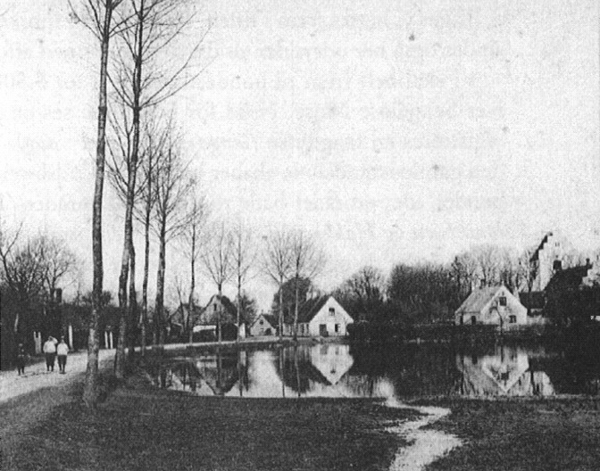 Photograph from Sengeløse, Denmark, around 1909